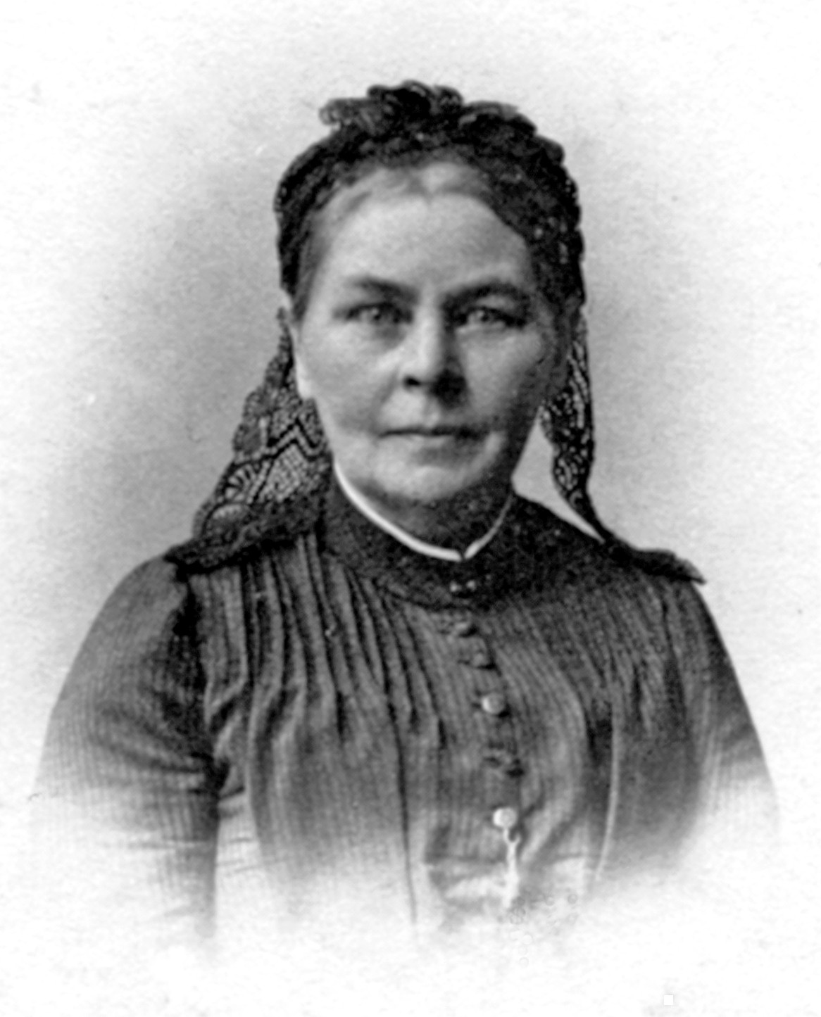 Minna Rüdiger als Witwe, ca. 1905.